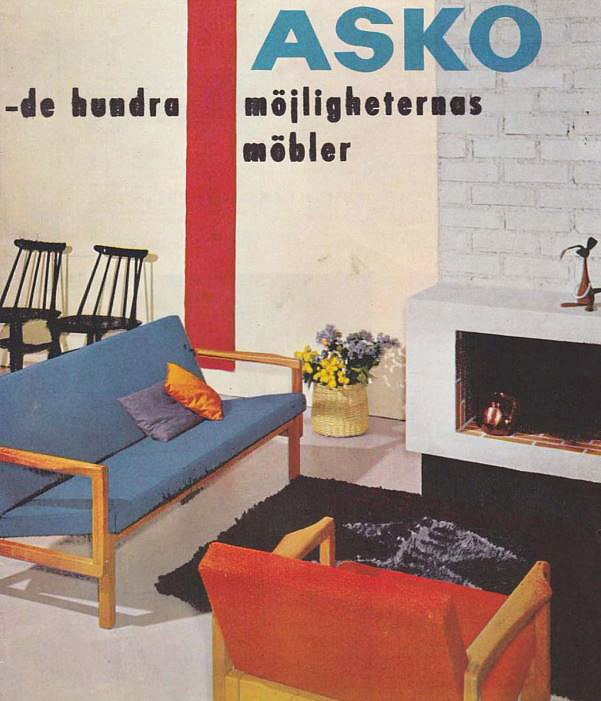 Produktkatalog för Asko Möbler